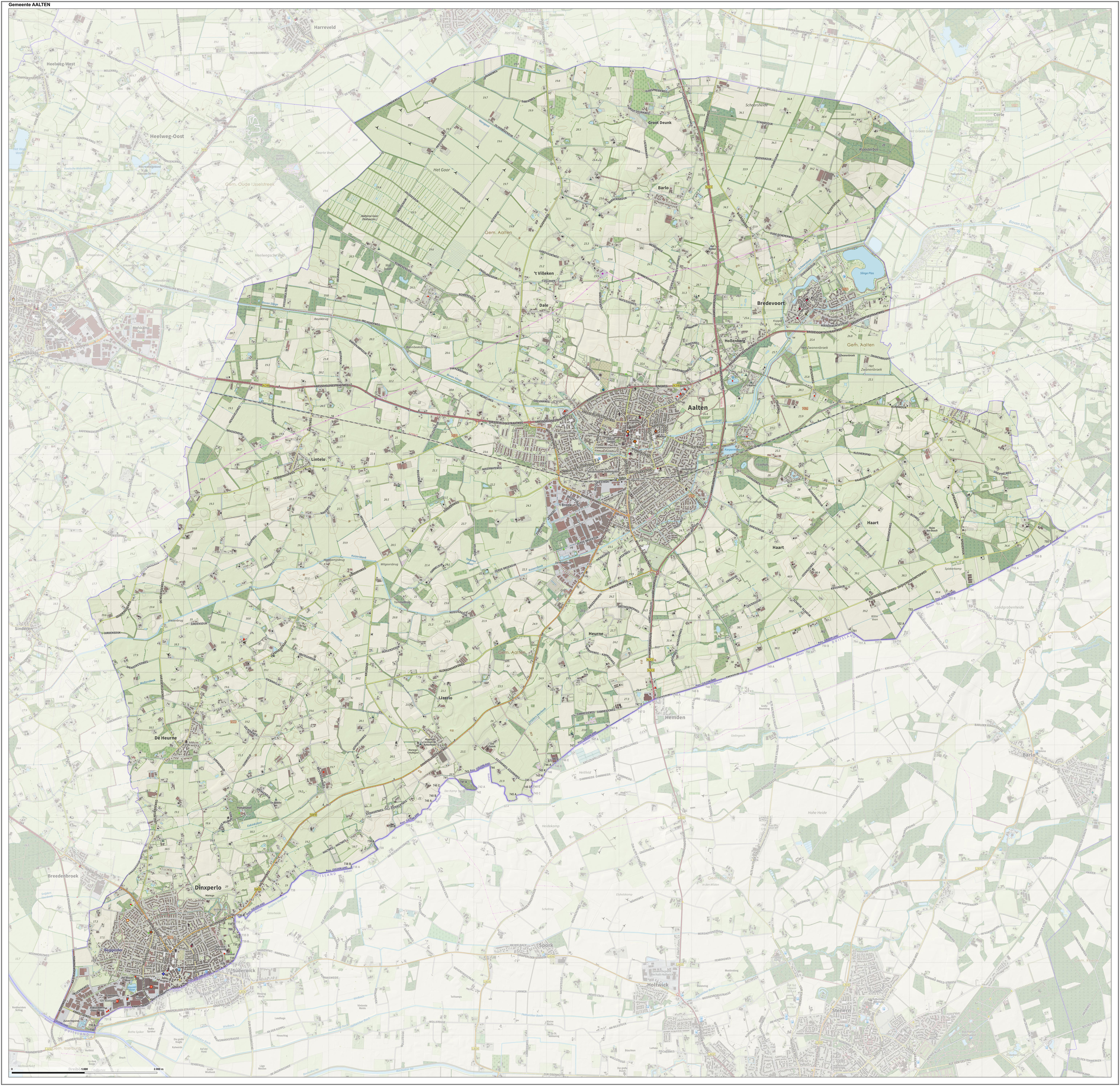 Topografische gemeentekaart. Resolutie: 400 pixels/km. Kaartbeeld samengesteld uit de open geodata van de Top10NL en Top25namen (Kadaster), Creative Commons-BY licentie. Gebouwvlakken uit open geodata BAG extract. Wegen uit de OpenStreetMap, OpenStreetMap community. Reliëfschaduw uit de Actuele Hoogtekaart AHN2. Samenstelling en kleurenschema: Jan-Willem van Aalst, met QGIS. Zie ook de Legenda.